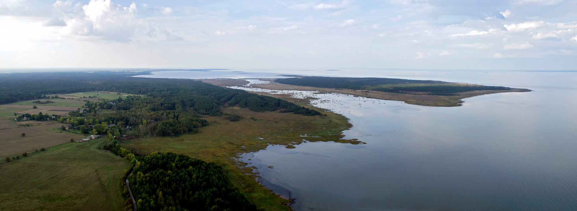 Vohilaid